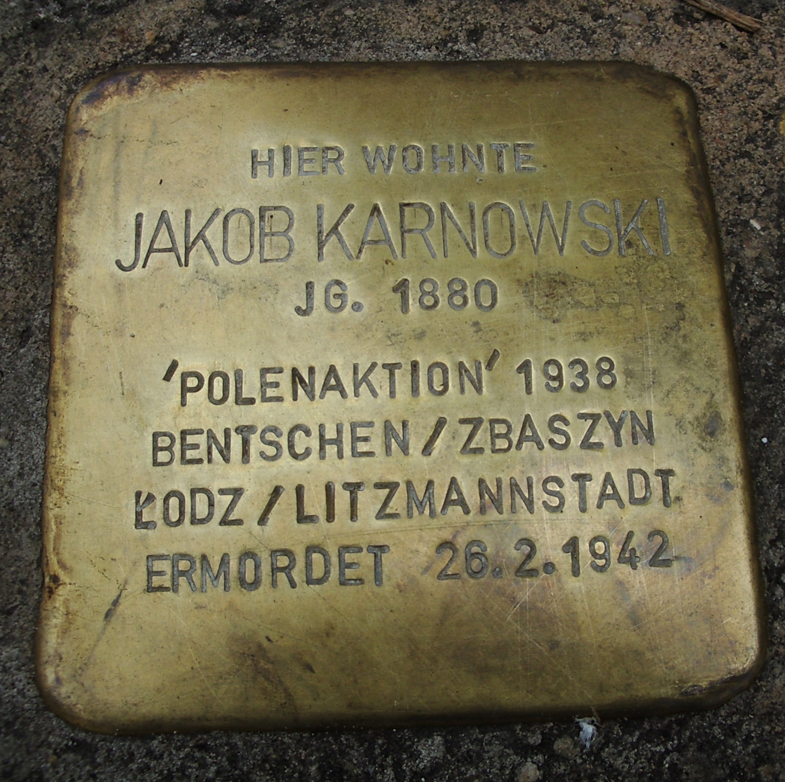 Der Stolperstein für Jakob Karnowski befindet sich in der Beethovenstraße 11 in Neu-Ulm, Stadtteil Offenhausen.